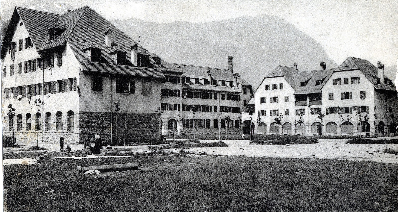 Phalanstère d'UGITECH conçu par Maurice Braillard